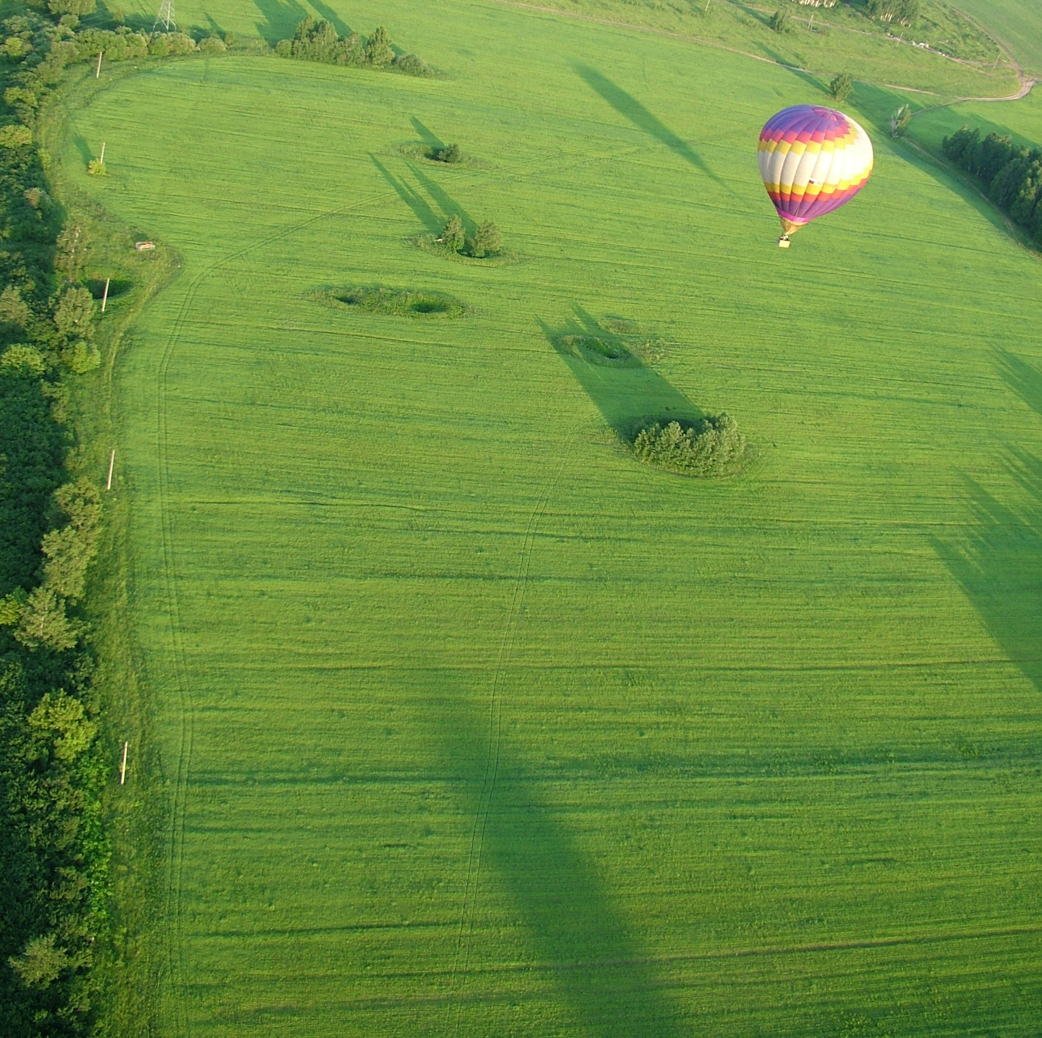 Воронки вблизи города Кунгур, Пермский край